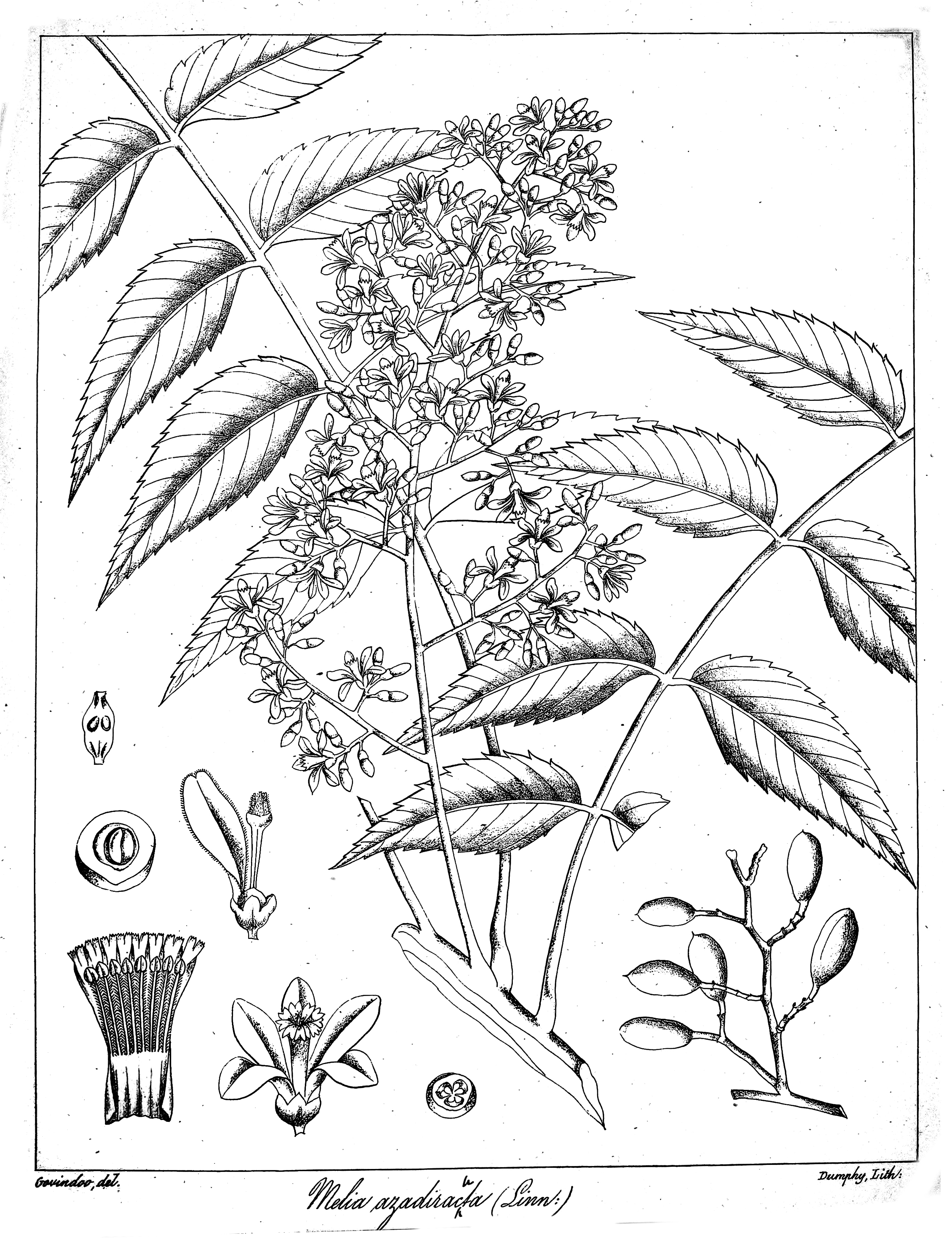 Melia azadirachta